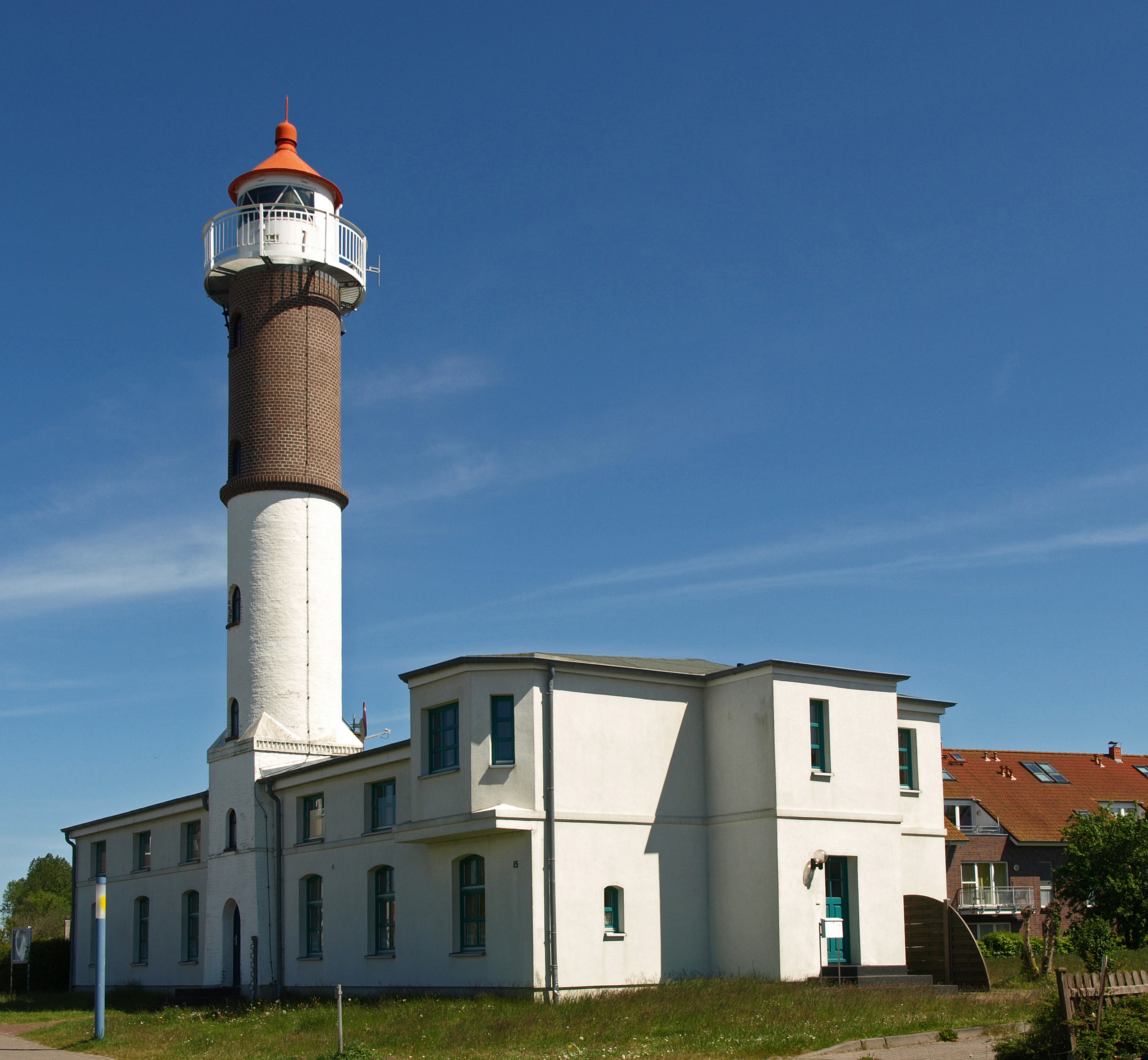 Leuchtturm Timmendorf